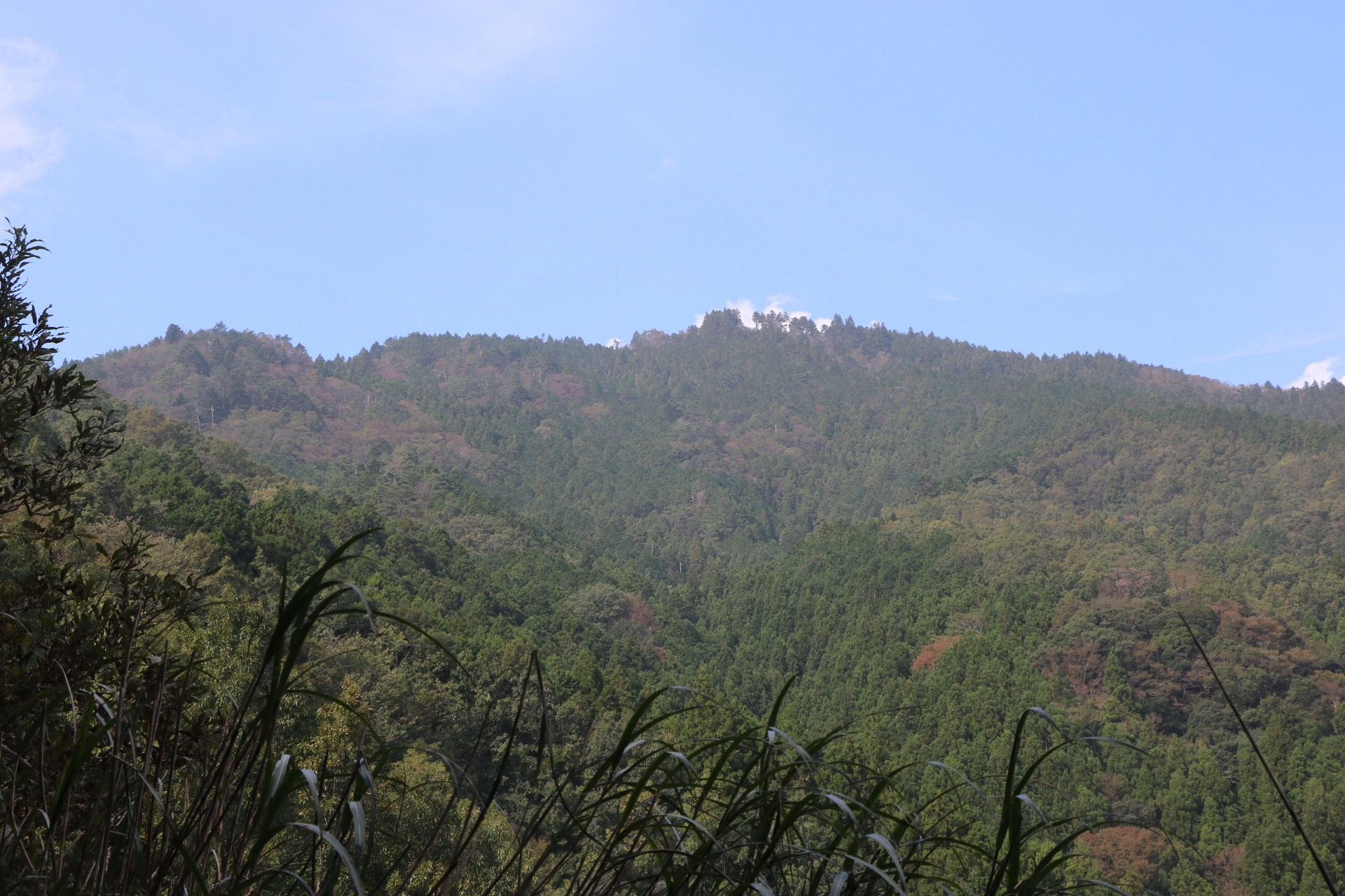 白猪山を道中より望む